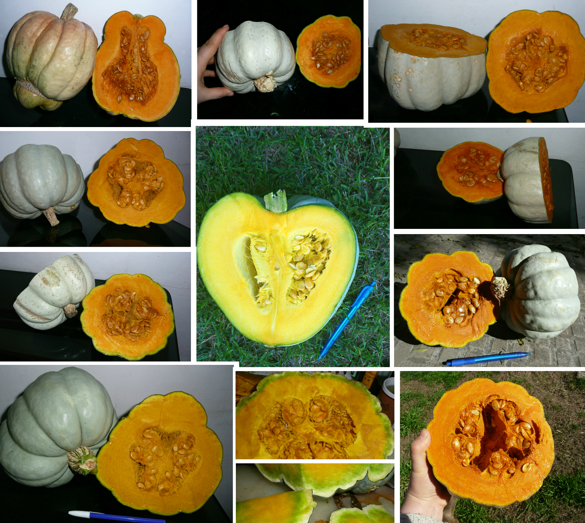 Diversidad de zapallos en una variedad tradicional (landrace). Cucurbita maxima zapallo plomo (semillas Costanzi).